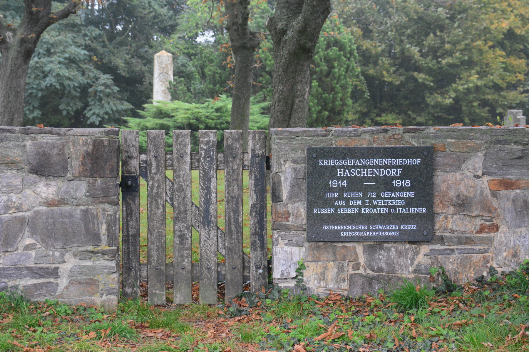 Kriegsgefangenenfriedhof Haschendorf in Neckenmarkt (Katastralgemeinde Haschendorf), Erster Weltkrieg